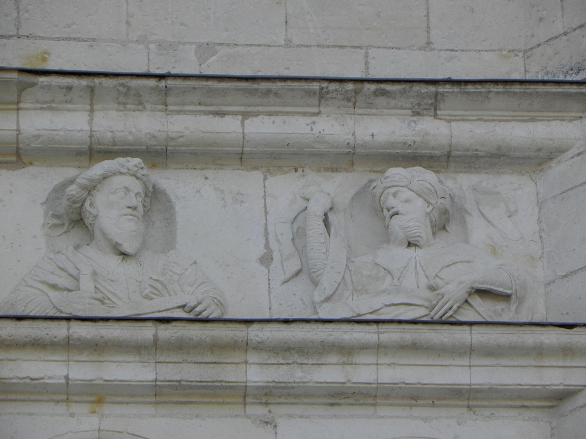 Prophètes. Détail de la frise de la collégiale Saint-Jean-Baptiste de Montrésor (37). .